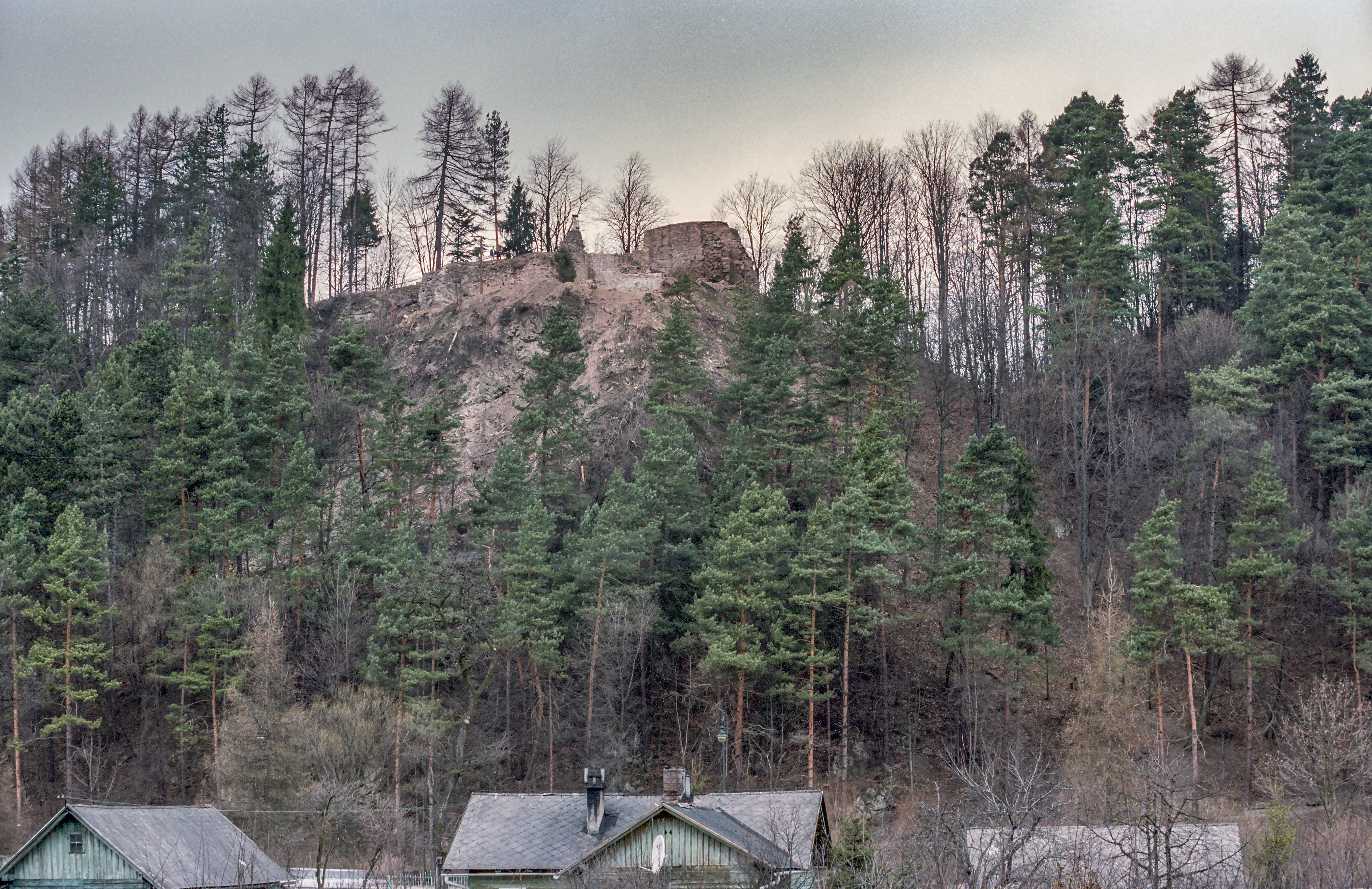 Muszyna, ruiny zamku